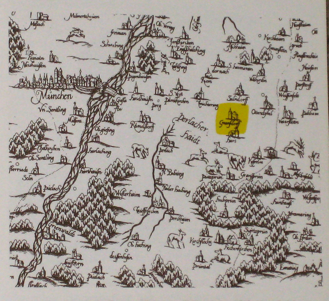 Karte von Gronsdorf bei München auf einer Wiedergabe der Karte von Philipp Apian von 1568